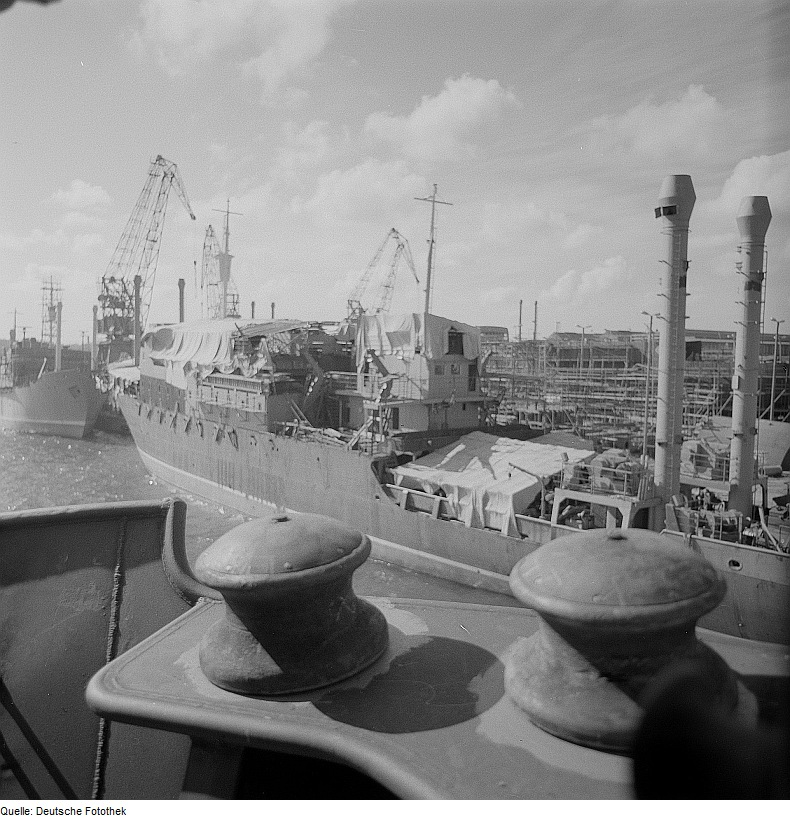 Original image description from the Deutsche Fotothek Stralsund. Hafen, Ansicht von einem Schiff, im Vordergrund Deckspoller